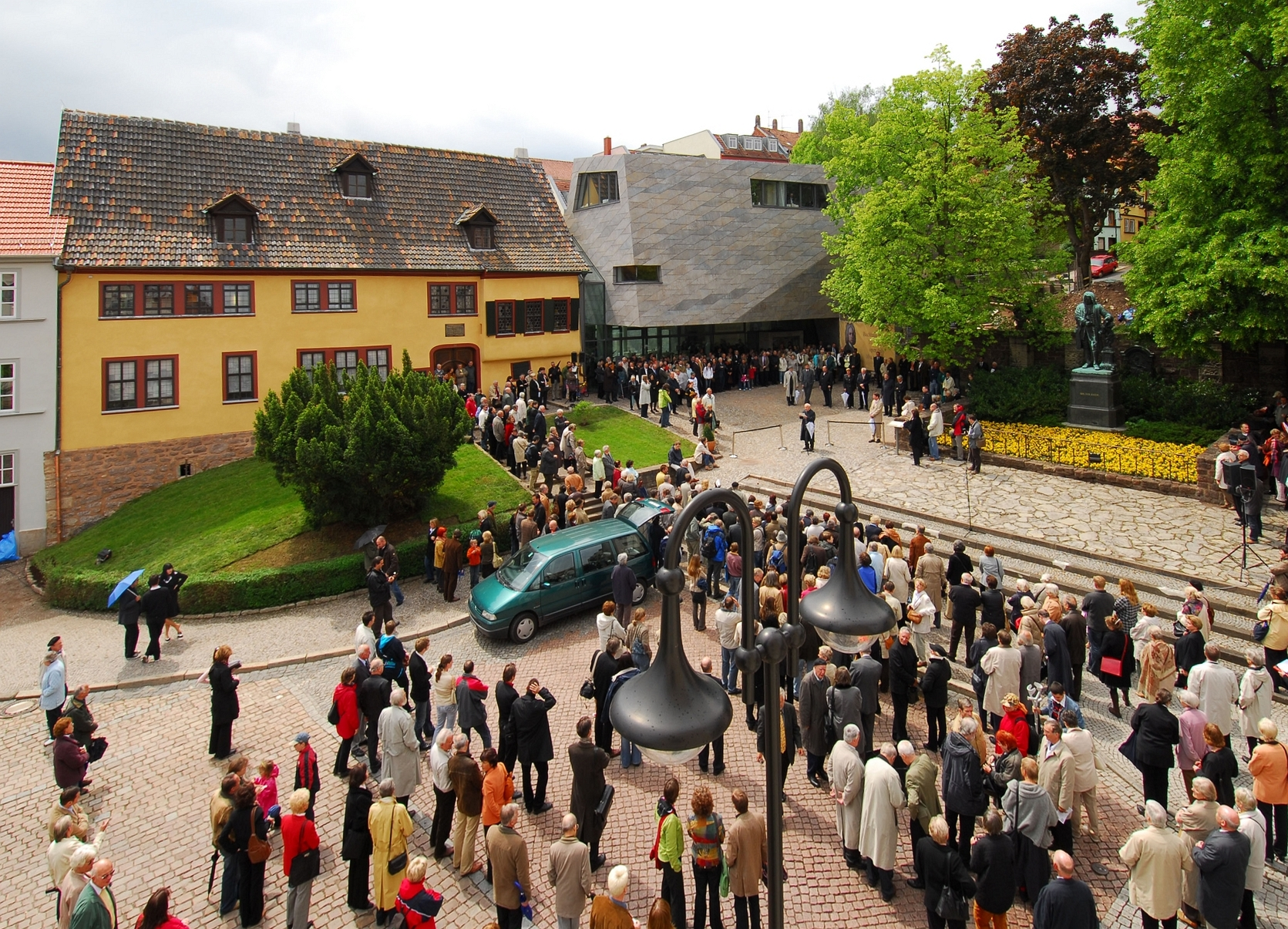 Wiederöffnung des Bachhaus Eisenach am 17. Mai 2007